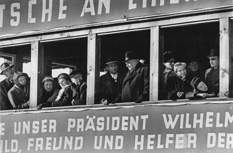 Illus TBD 7.3.1951 II. Wintersportmeisterschaften der Deutschen Demokratischen Republik vom 11.-18.2.51 in Oberhof UBz: Präs. Pieck auf der Ehrentribüne.